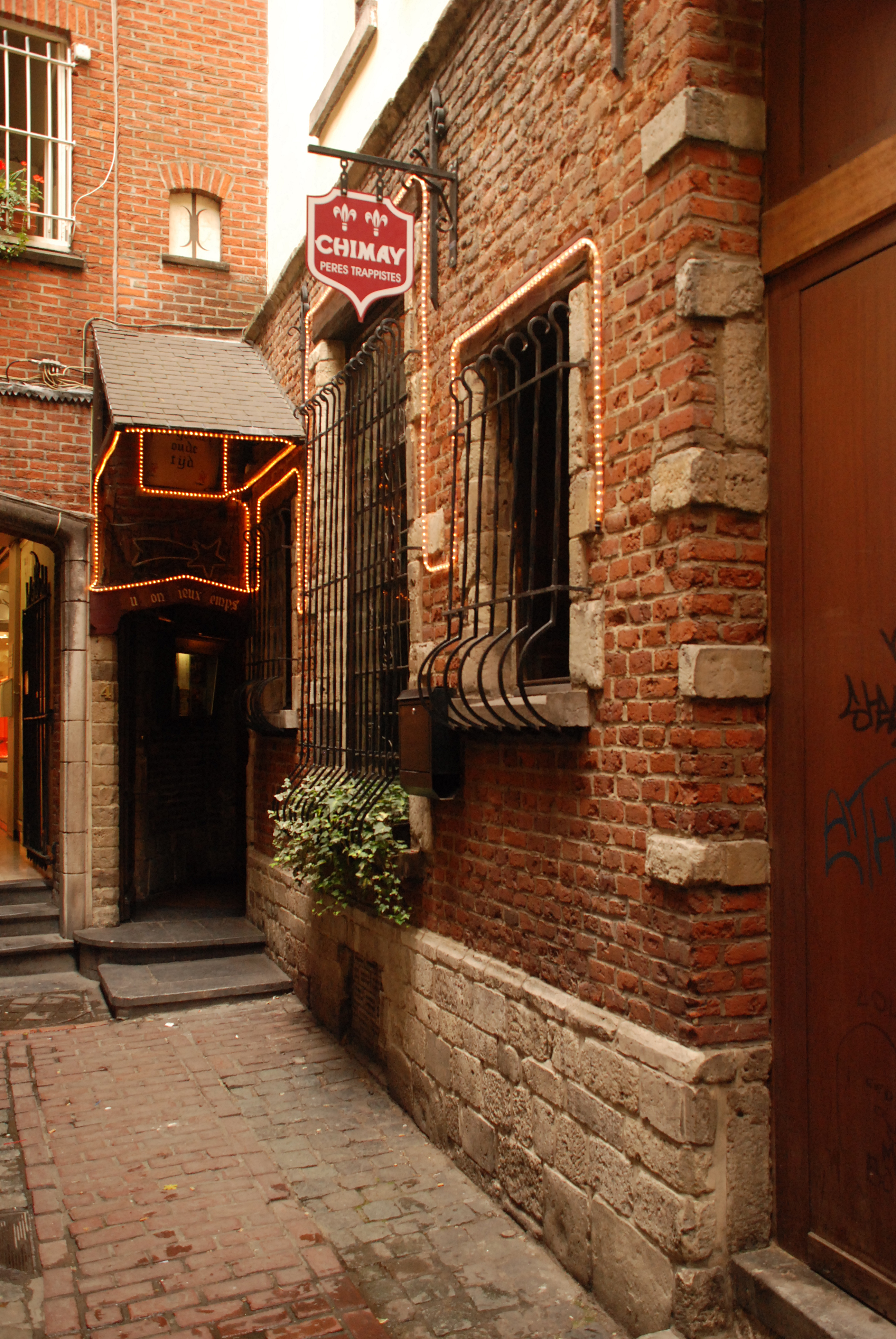 Belgique - Bruxelles - Impasse Saint-Nicolas